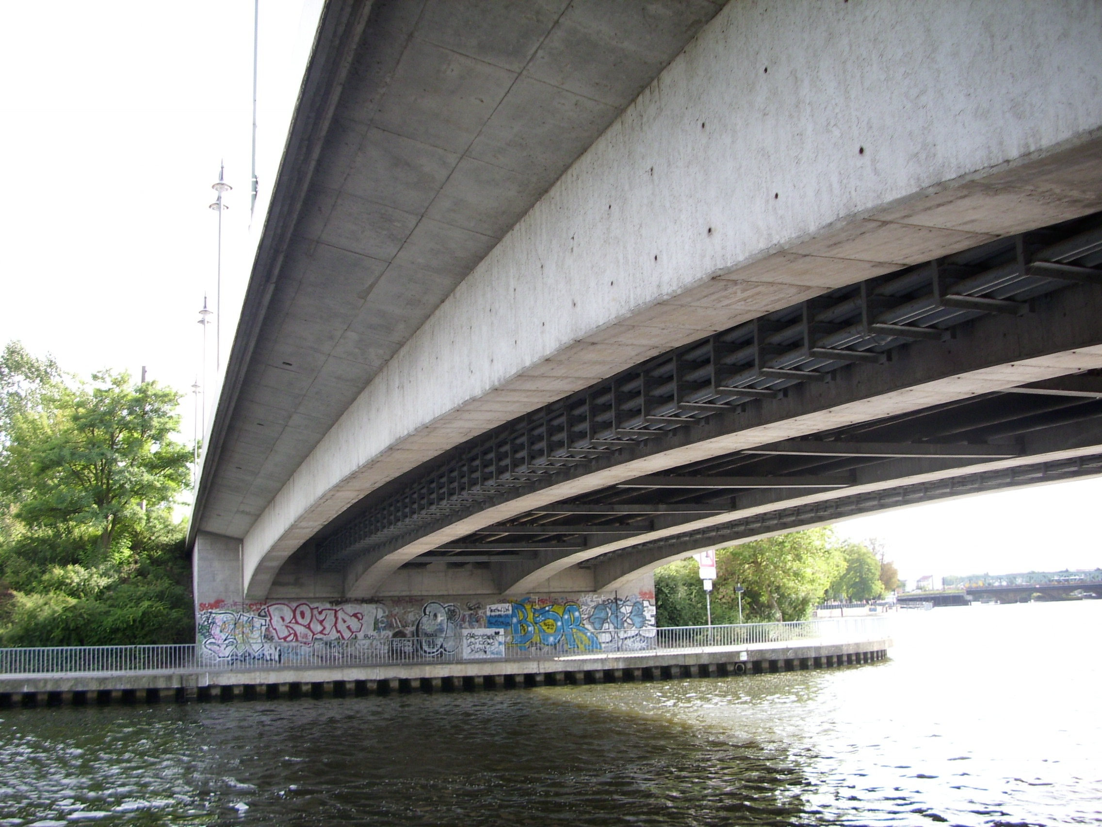 Dammbrücke von unten